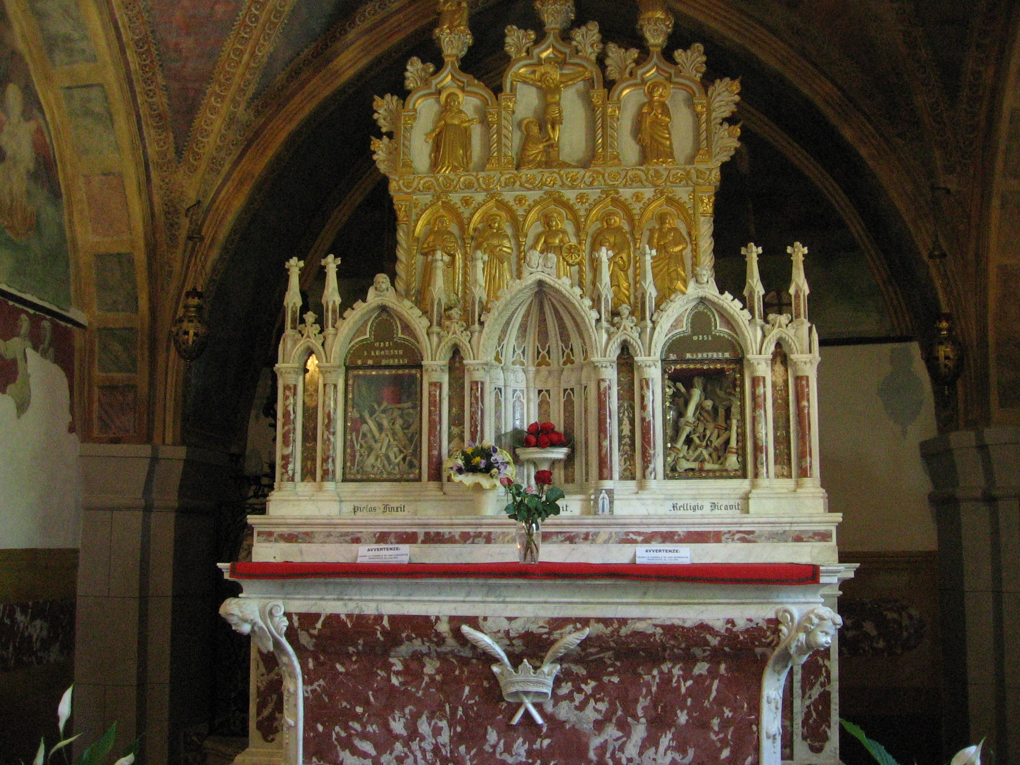 Le reliquie di Santa Augusta. Foto scattata nell'omonimo santuario.